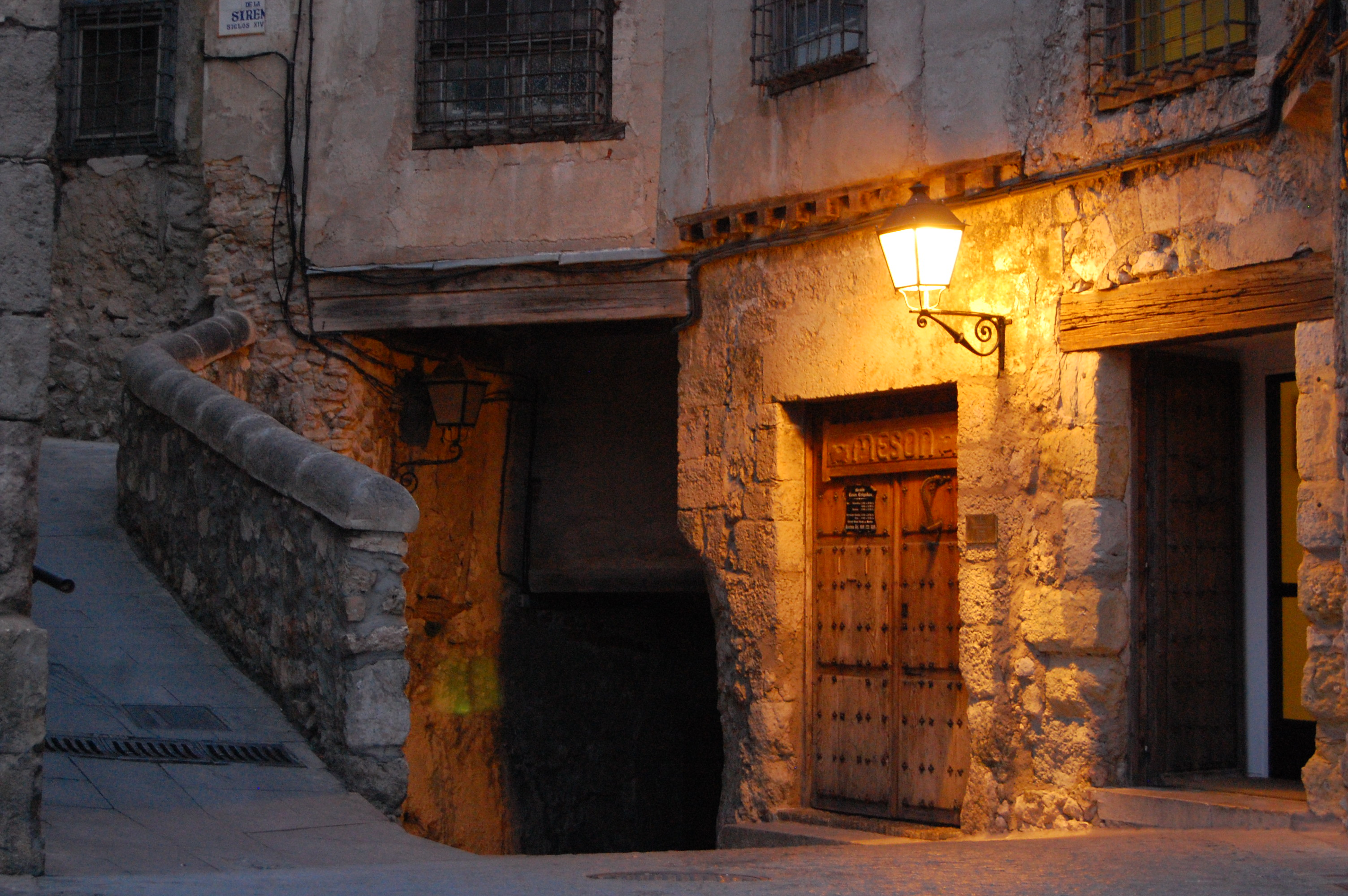 Entrada del Museo de Arte Abstracto Español (Casa del Rey) en Cuenca, al lado de la Casa de la Sirena.